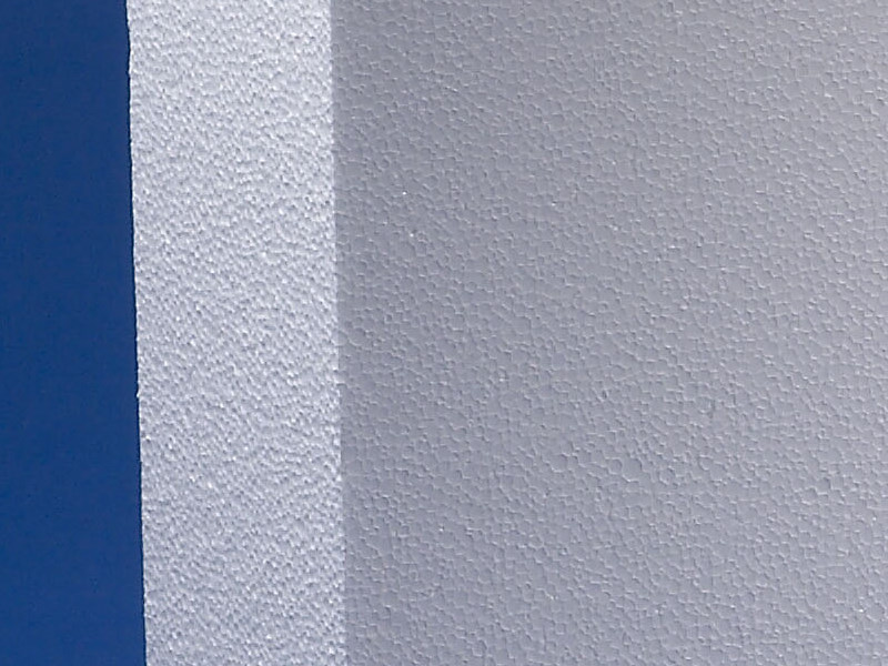 Качественный пенополистирол